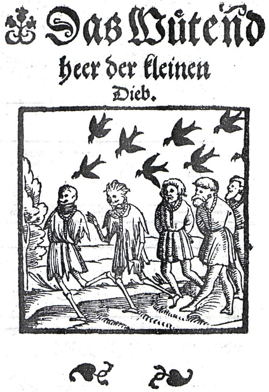 Wütendes Heer, Druck Basel 1569 (cropped)